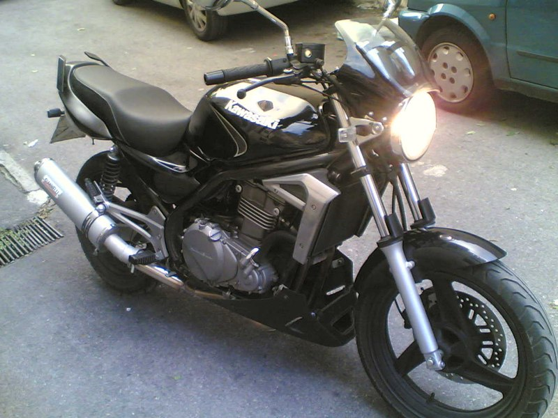 kawasaki er5 modificata con puntale powerbronze in simil carbonio, leve in similcarbonio, codino artigianale, retine cromate copri radiatore e terminale giannelli in alluminio